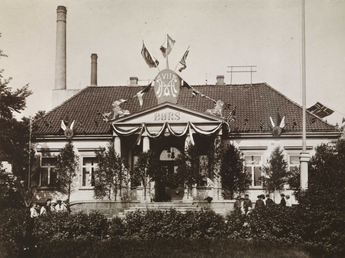 Kristiansand børs pyntet med flagg ved S/S Kristianiafjords første tur Kristiania - Bergen, juni 1913